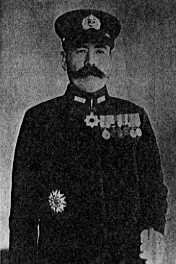 Japanese admiral Masatomi Kimura (1891-1960)